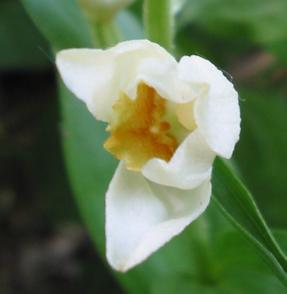 Cephalanthera damasonium